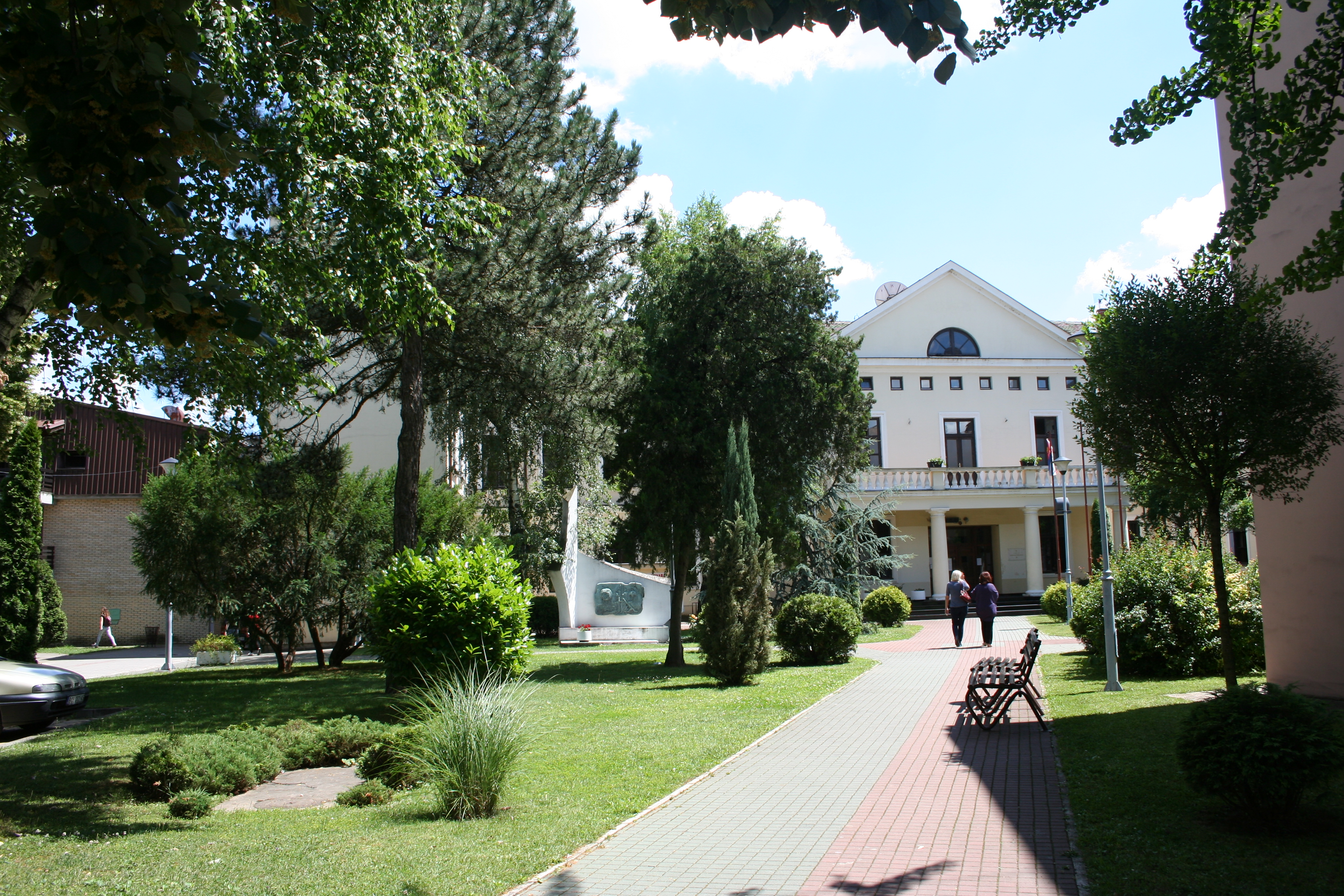 Šabačka gimnazija